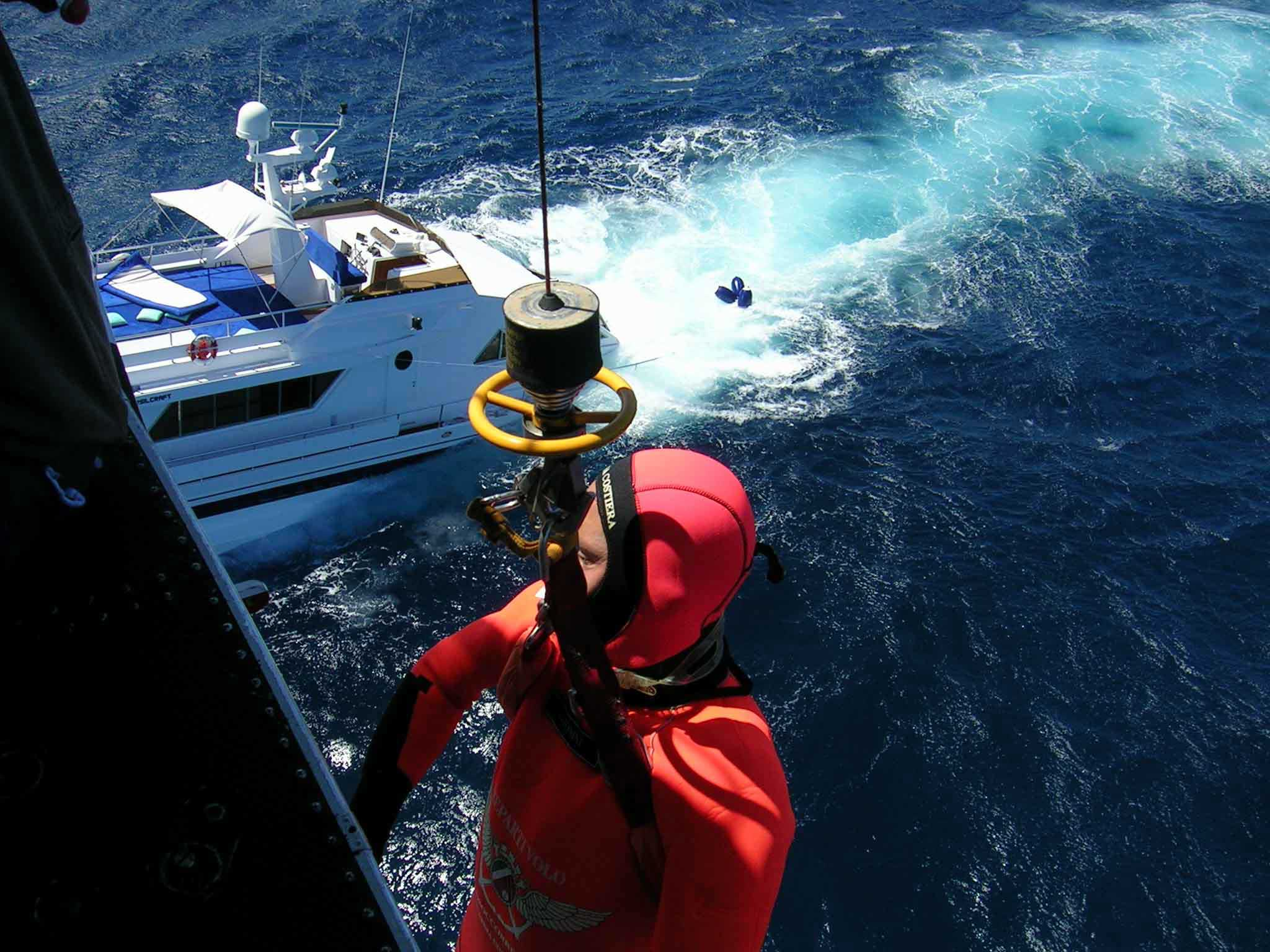 Un operatore di volo della Guardia Costiera a bordo di un AB-412 CP "Koala" effettua il recupero di un aerosoccorritore con il verricello di bordo